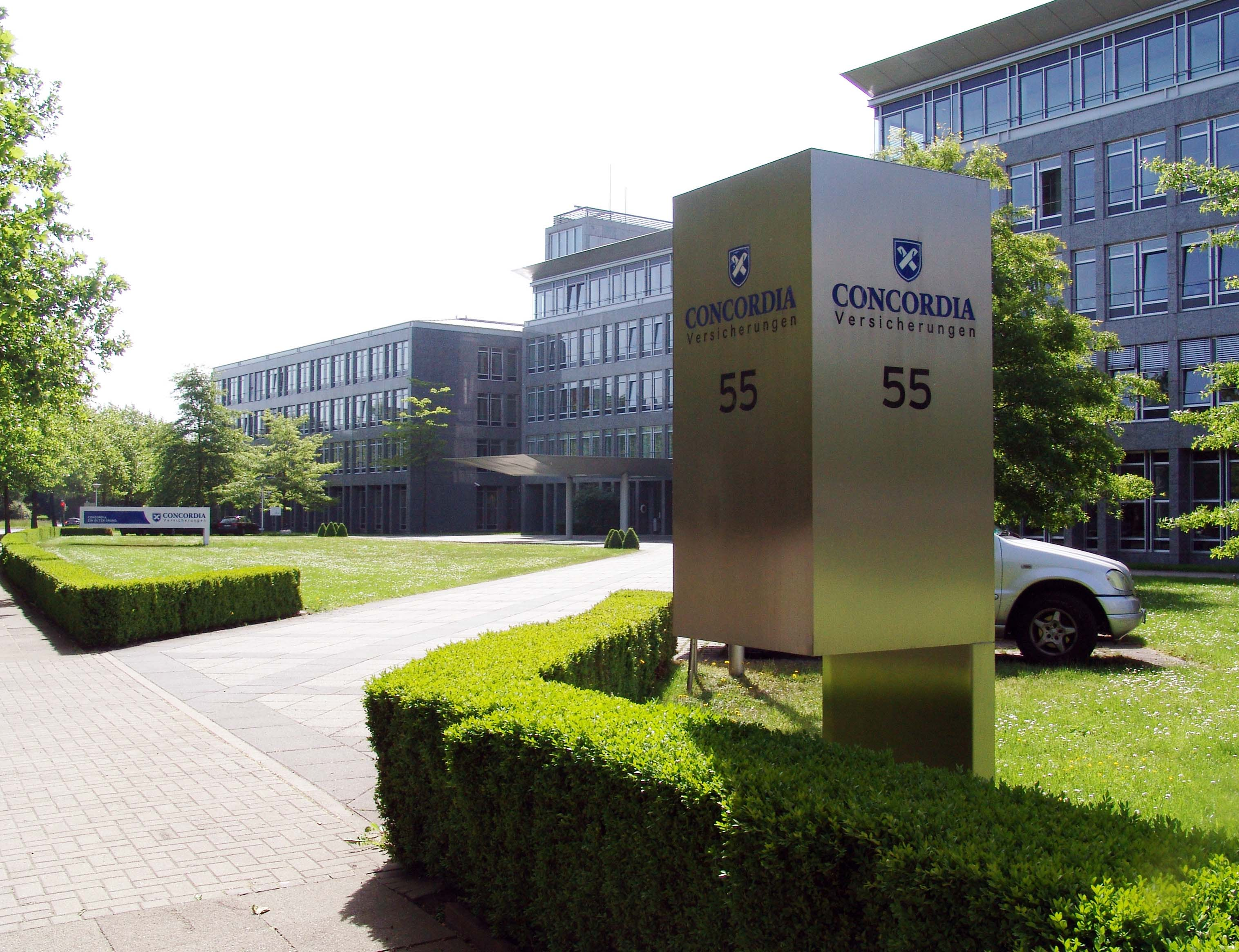 Hauptansicht Direktionsgebäude Concordia Versicherungen Hannover